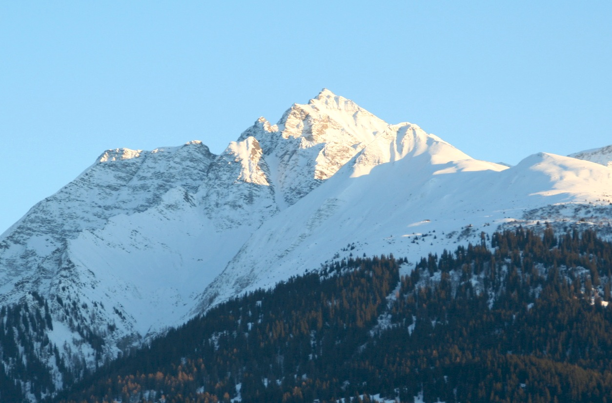 Piz Fess